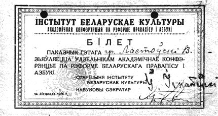 Беларуская (тарашкевіца): Білет удзельніка Акадэмічнае канфэрэнцыі па рэформе беларускага правапісу і азбукі 1926 году. Білет Вацлава Ластоўскага.